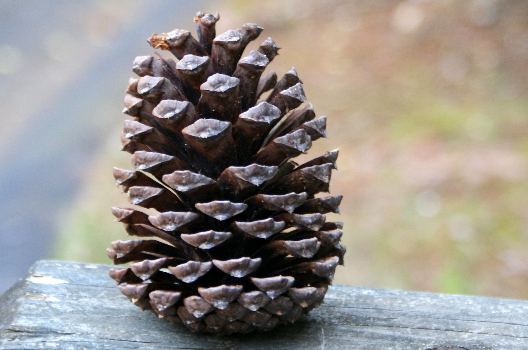 Pinus elliottii var. elliottii cone. Georgia, USA.